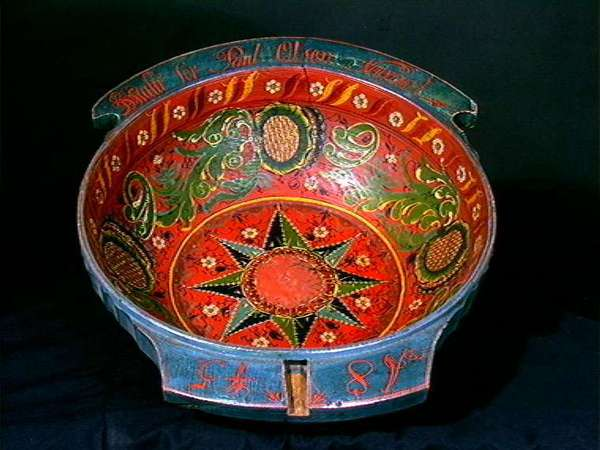 Trøys fra Hol i Hallingdal, malt av Pål Olson Grøt til seg selv. Innskrift: Malet for Paul Olsen Neeraal 1845. Foto Anne_lise Reinsfelt, Norsk Folkemuseum, NF.1898-0181.